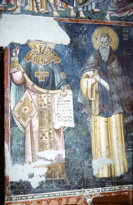 Fresco en el monasterio de Ohrid (Macedonia), con los santos Teodoro Estuditay Pablo el Simple